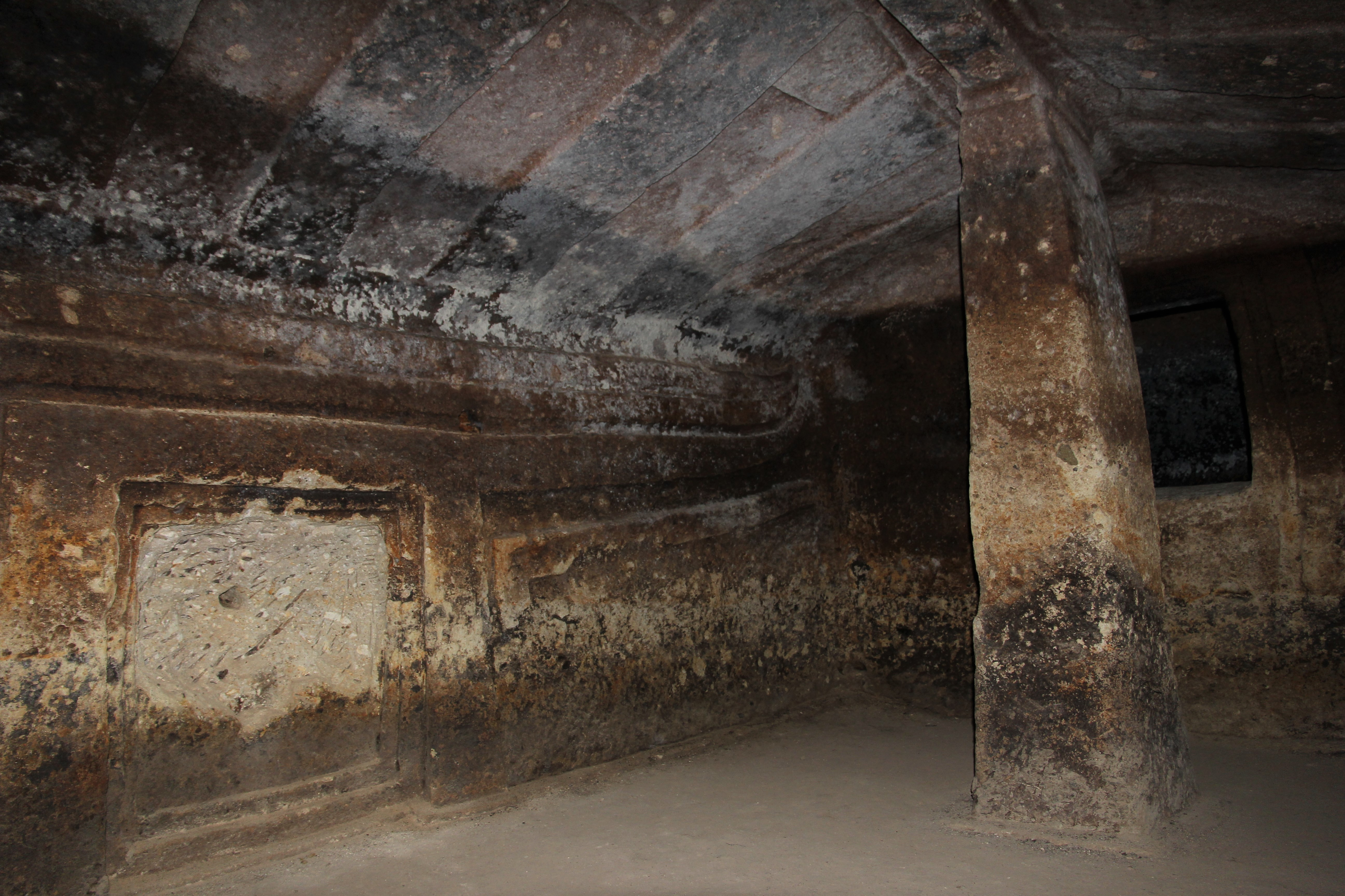 Putifigari, necropoli di Monte Siseri